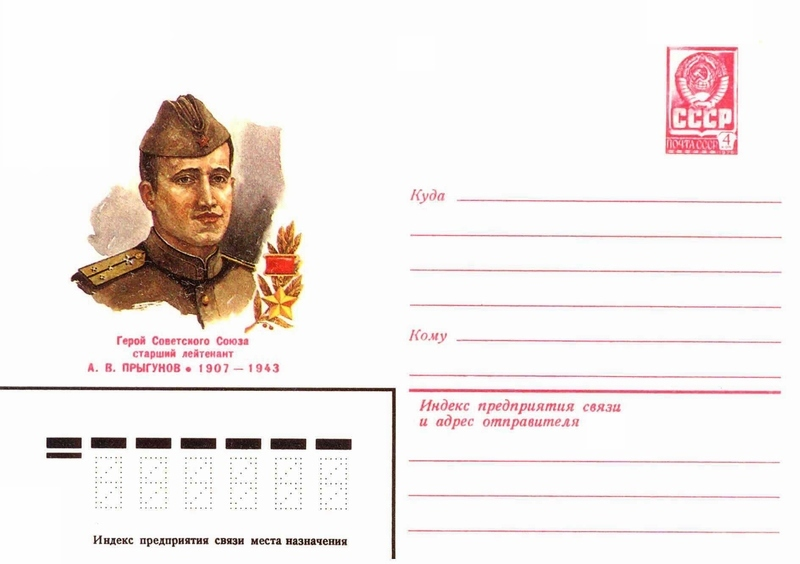 Художественные маркированные конверты 1982 года.